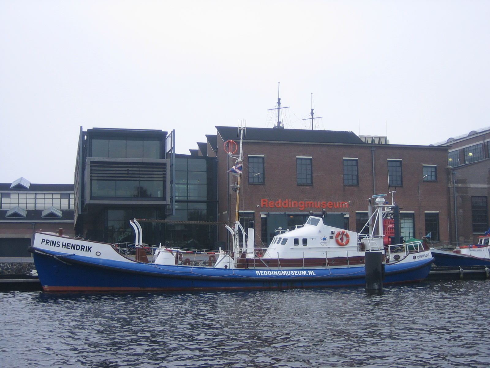 Museumreddingboot Prins Hendrik afgemeerd voor het Reddingmuseum